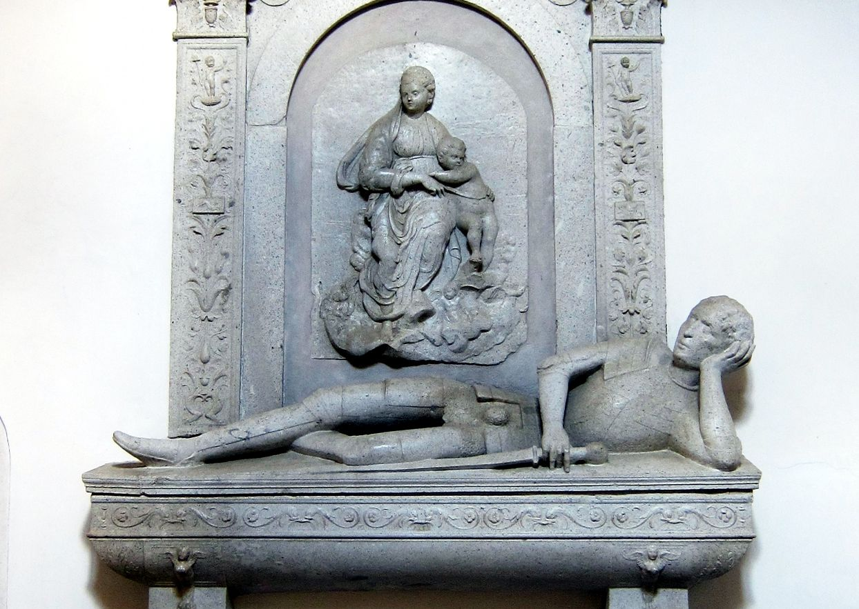 Monumento tombale a Tommaso II Sanseverino - Certosa di Padula